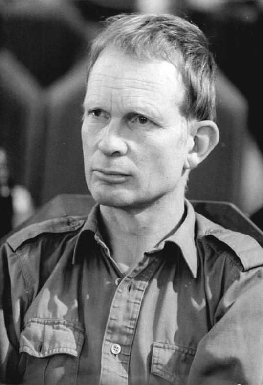 Klaus Schlüter ADN-ZB Settnick-5.2.90 Berlin: Klaus Schlüter, wurde von der Grünen Liga als Minister ohne Geschäftsbereich benannt.